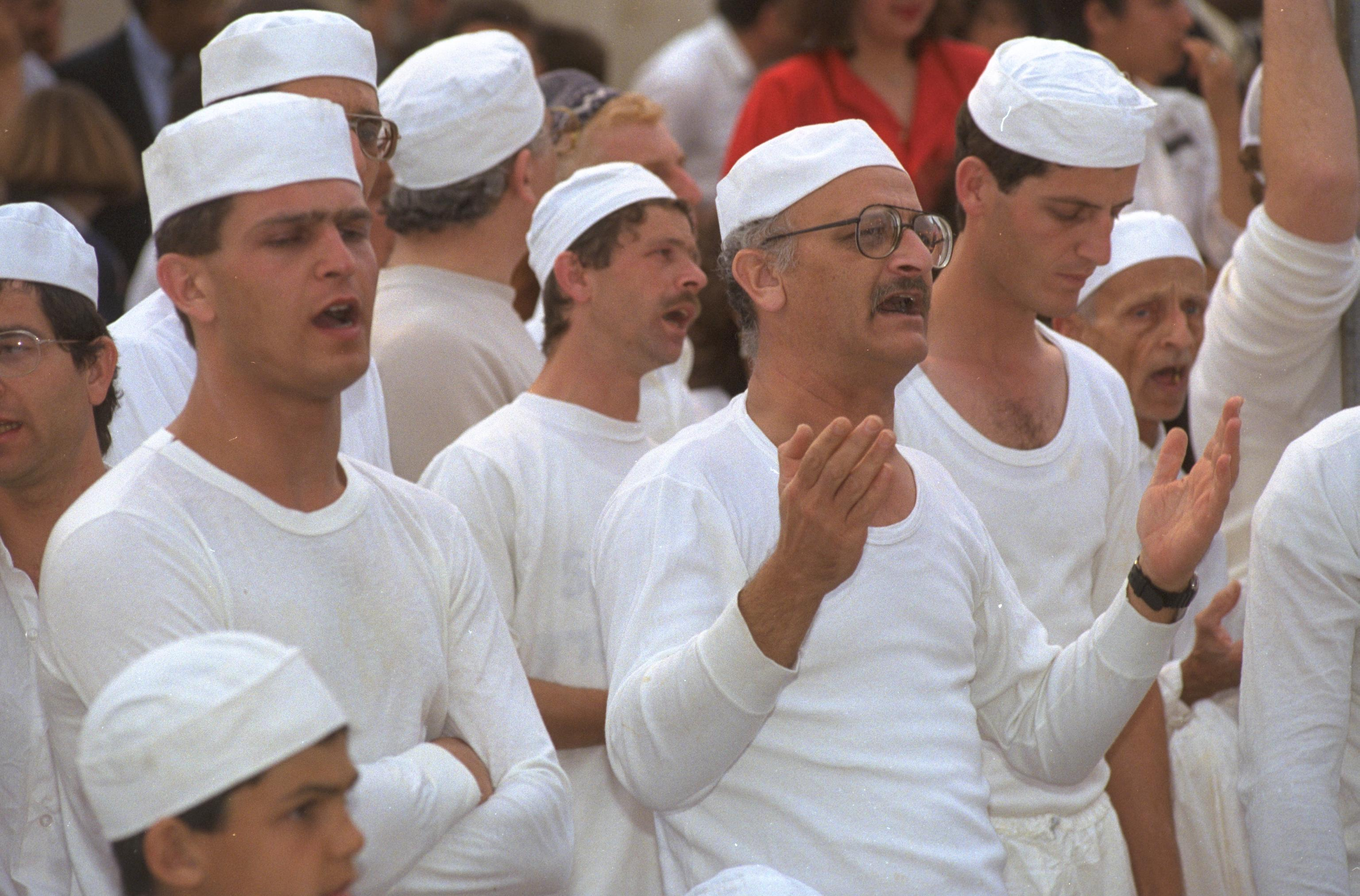 Samaritans praying during Passover holiday ceremony on mount Grizim. חברי הקהילה השומרונית, מתפללים לפני טקס הקורבן המסורתי בחג הפסח על הר גריזים Photo